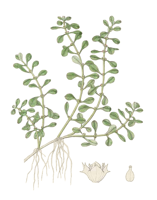 Illustration of Peplis portula Linné